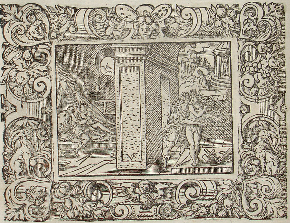 Pygmalion